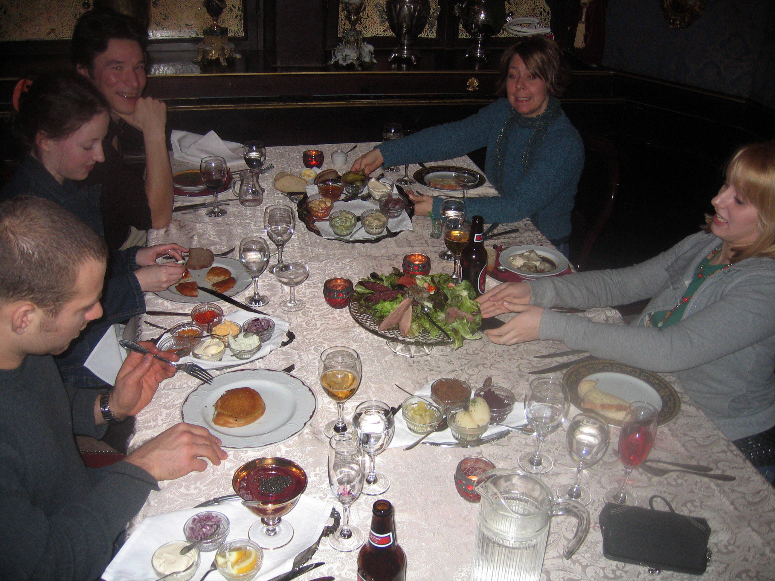 Zakuska are Russian appetizers.